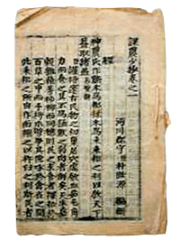 朴趾源作、課農小抄